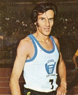 L'atleta italiano Gianni Del Buono